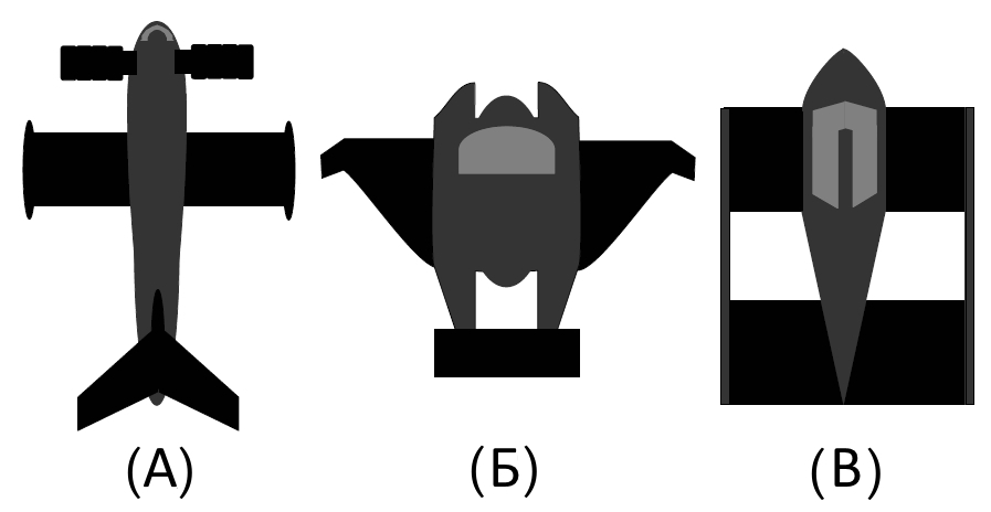 Компоновка крыльев.